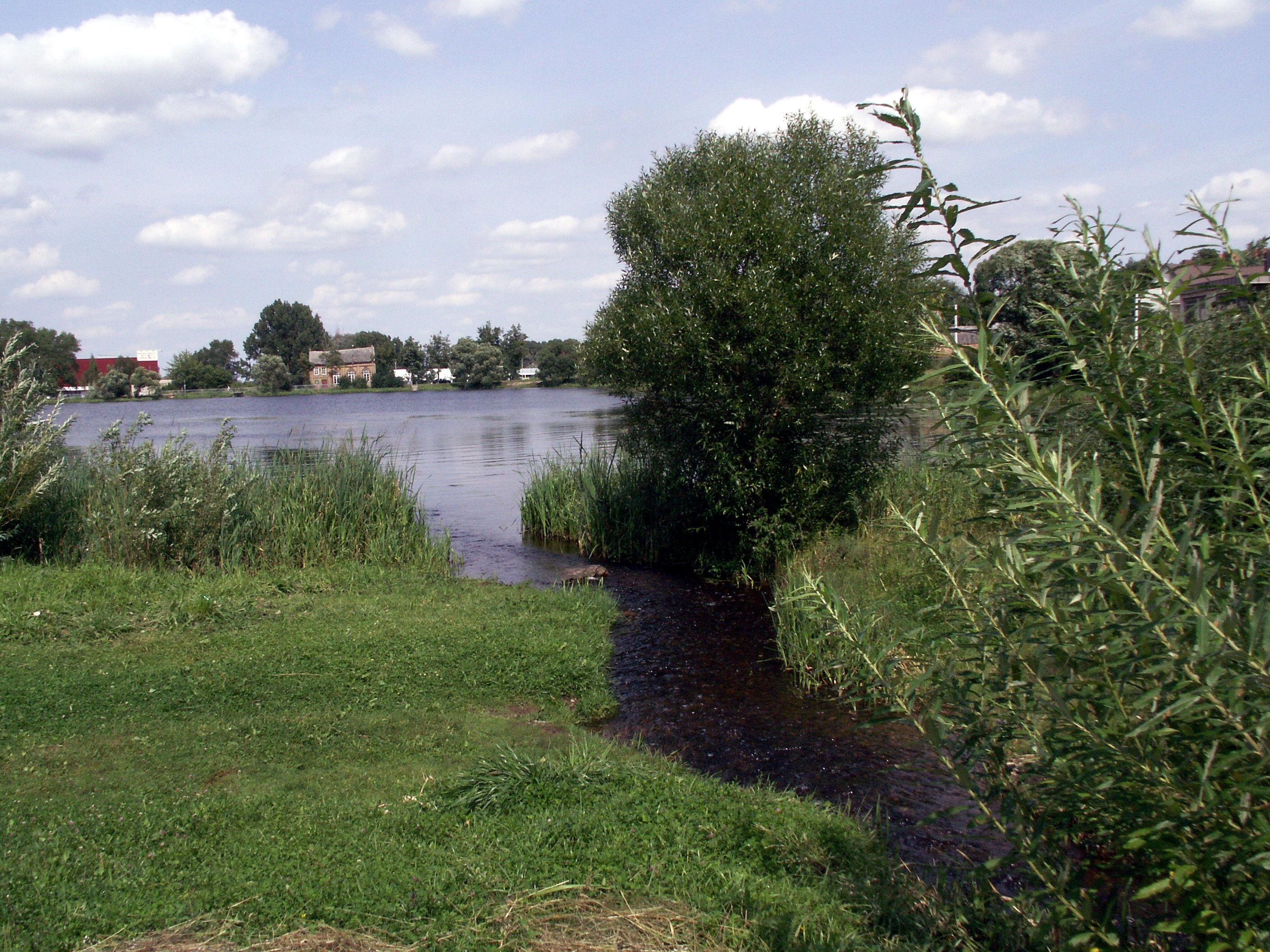 Kulpė įtakoje į Prūdelį